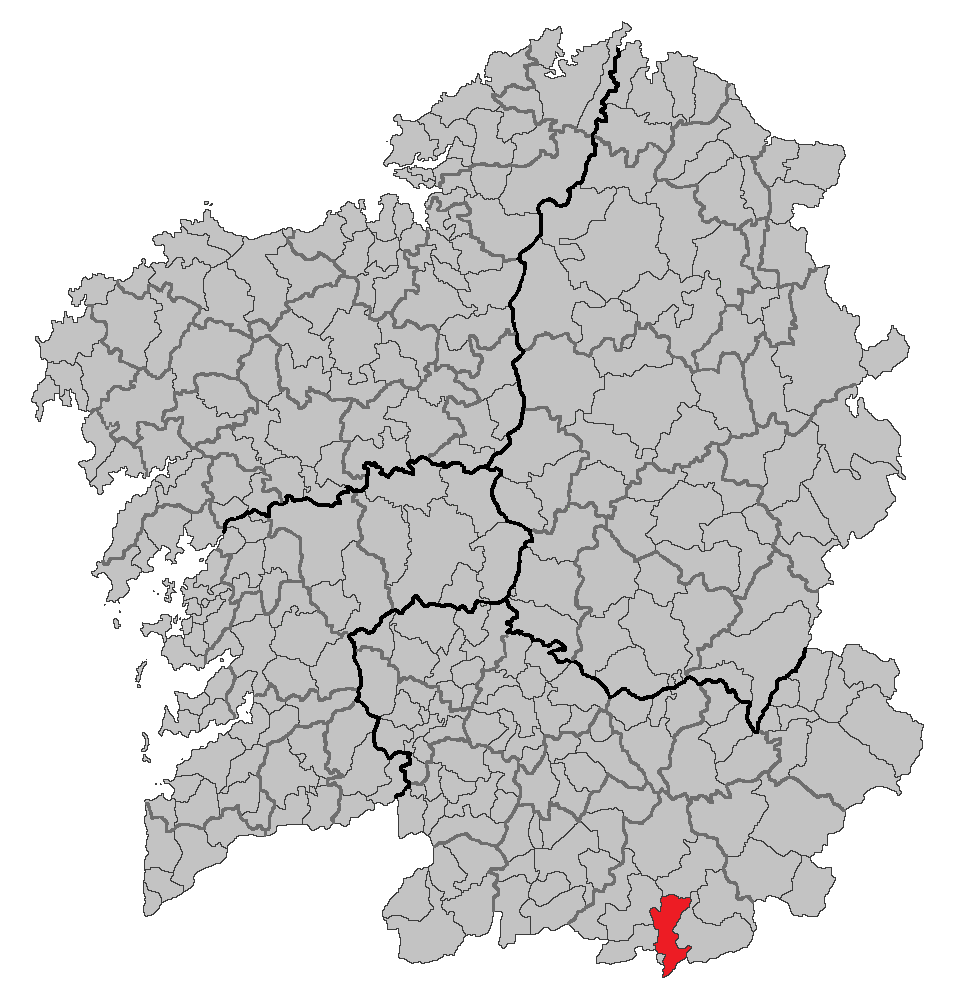 Mapa coa localización do concello de Verín.